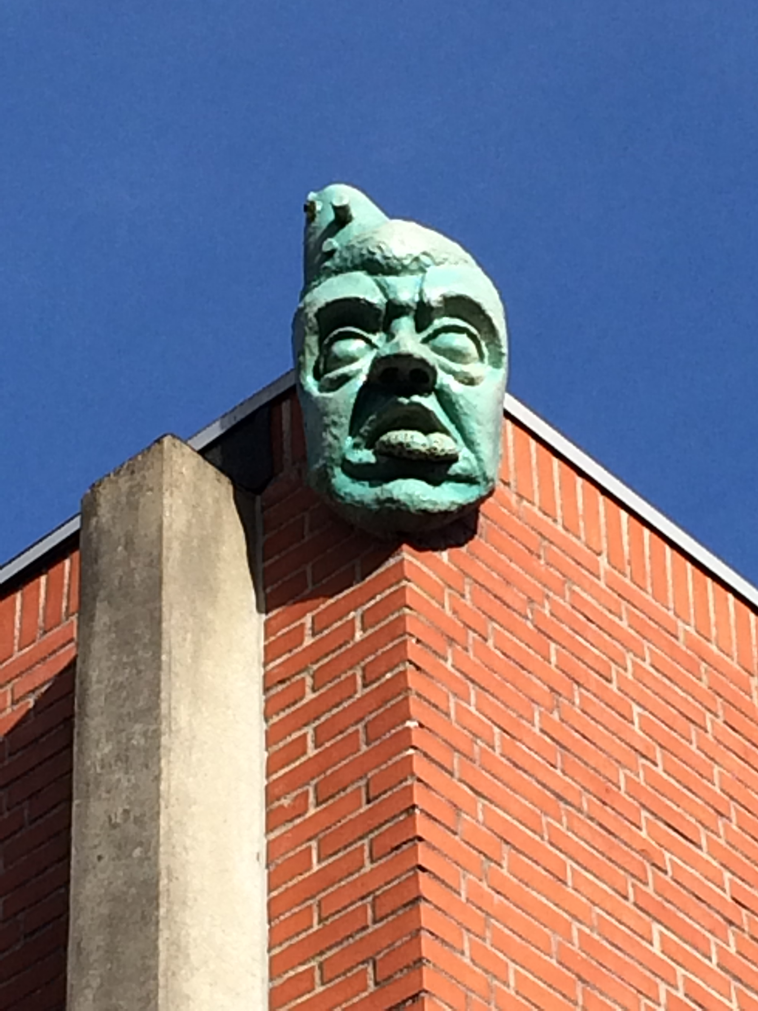 Fantasy head facing southwest on Tallerup school sports gym